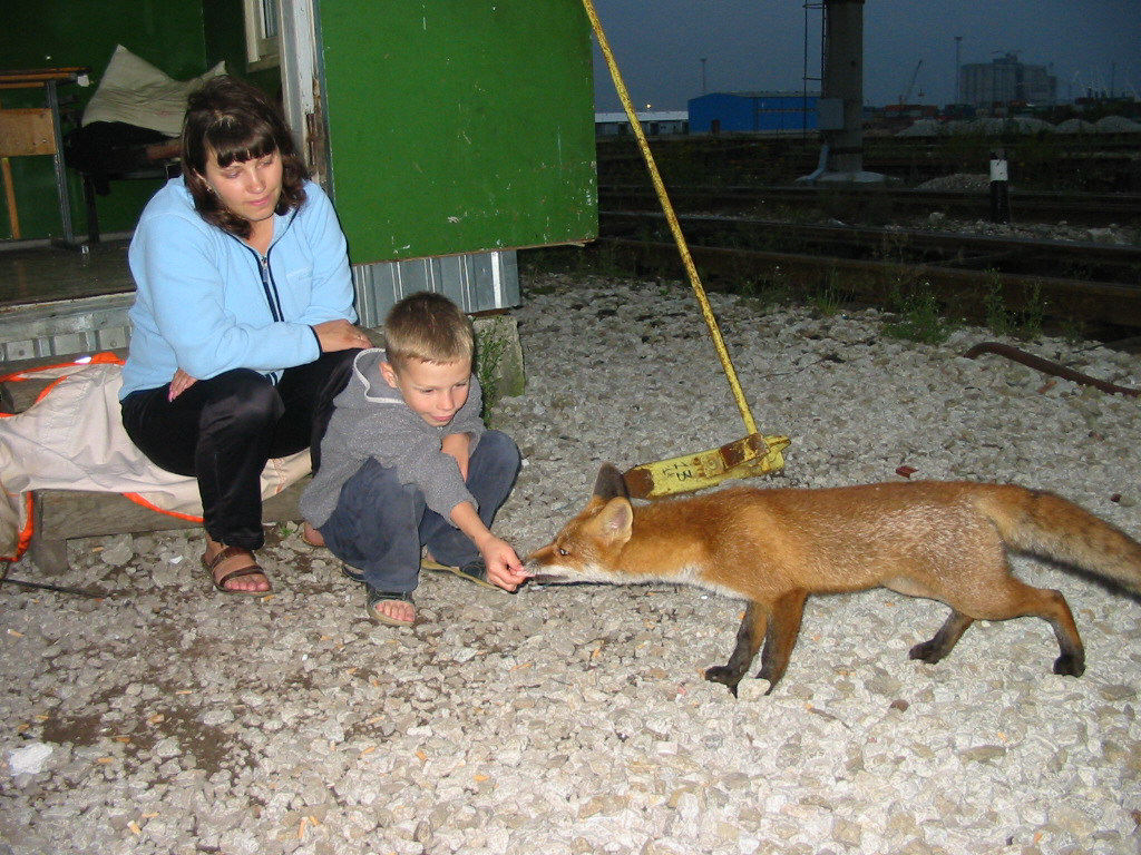 Прикормленная лиса на ЖД терминале Мууга. Эстония.